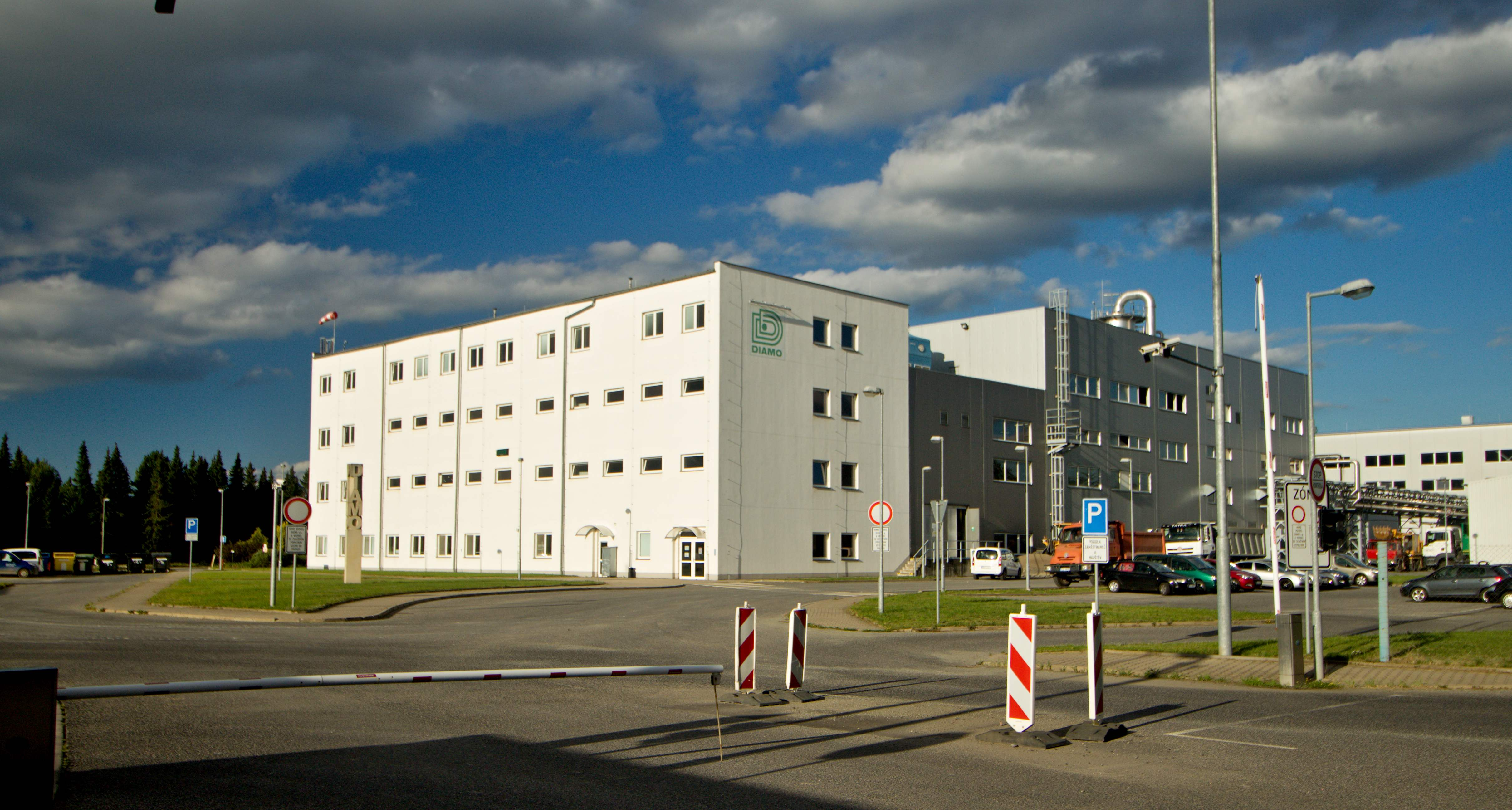 Podnik Diamo ve Stráži pod Ralskem